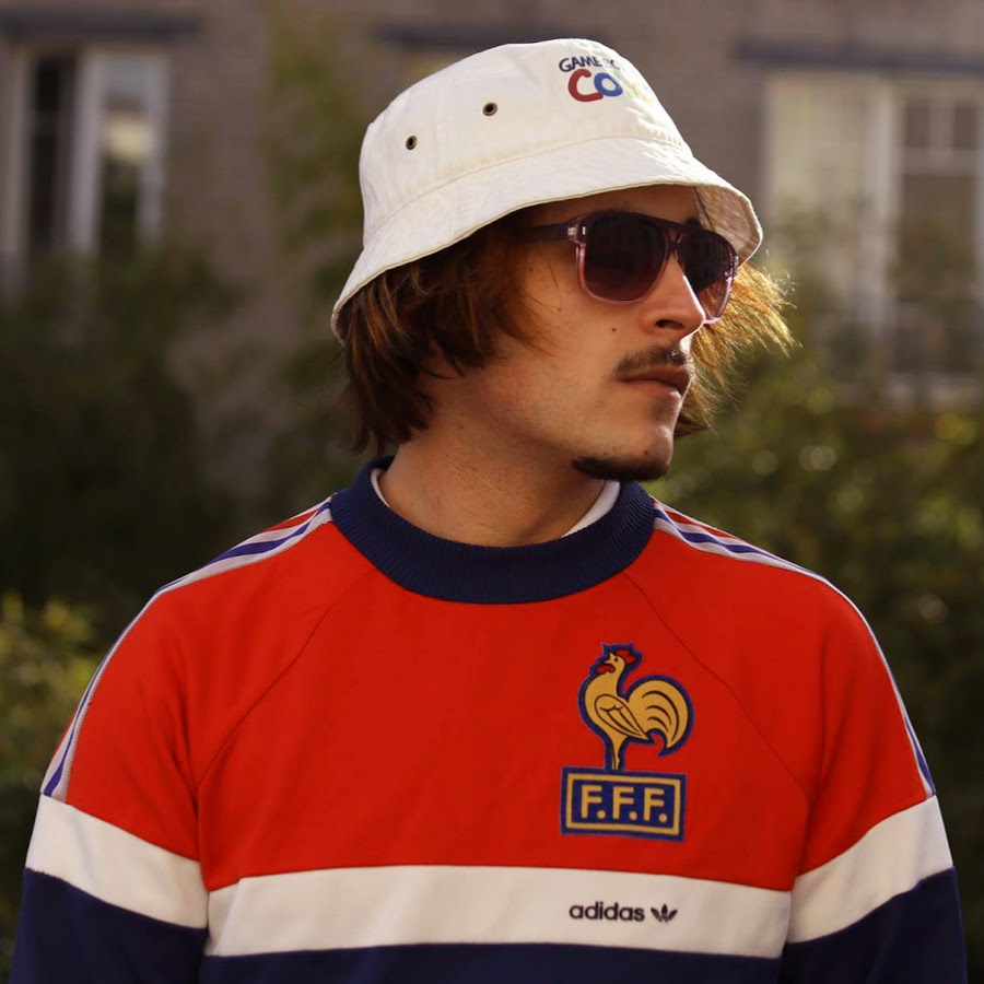 Lorenzo Rappeur Rennais